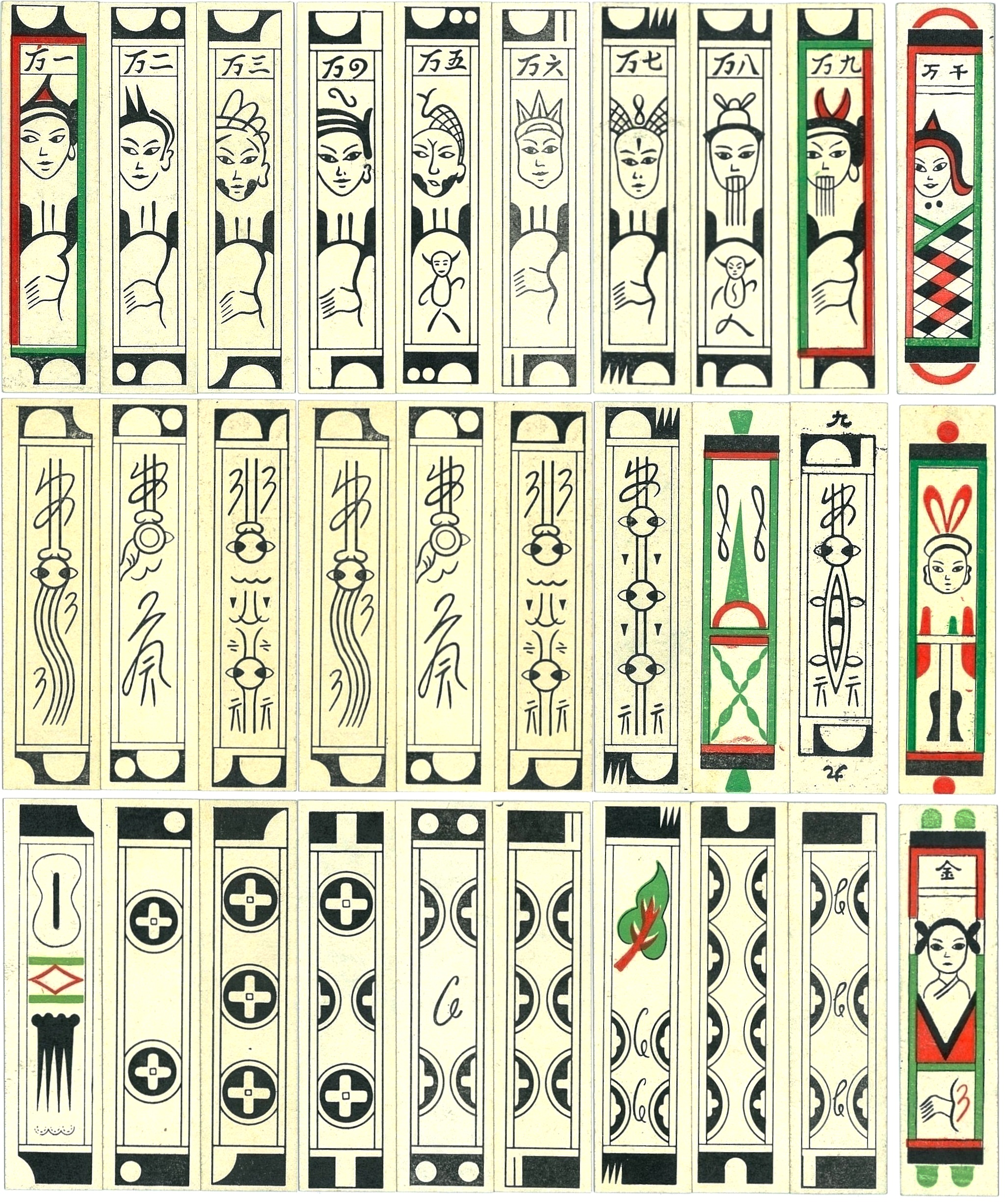 中文（台灣）: 天津的傳統紙牌